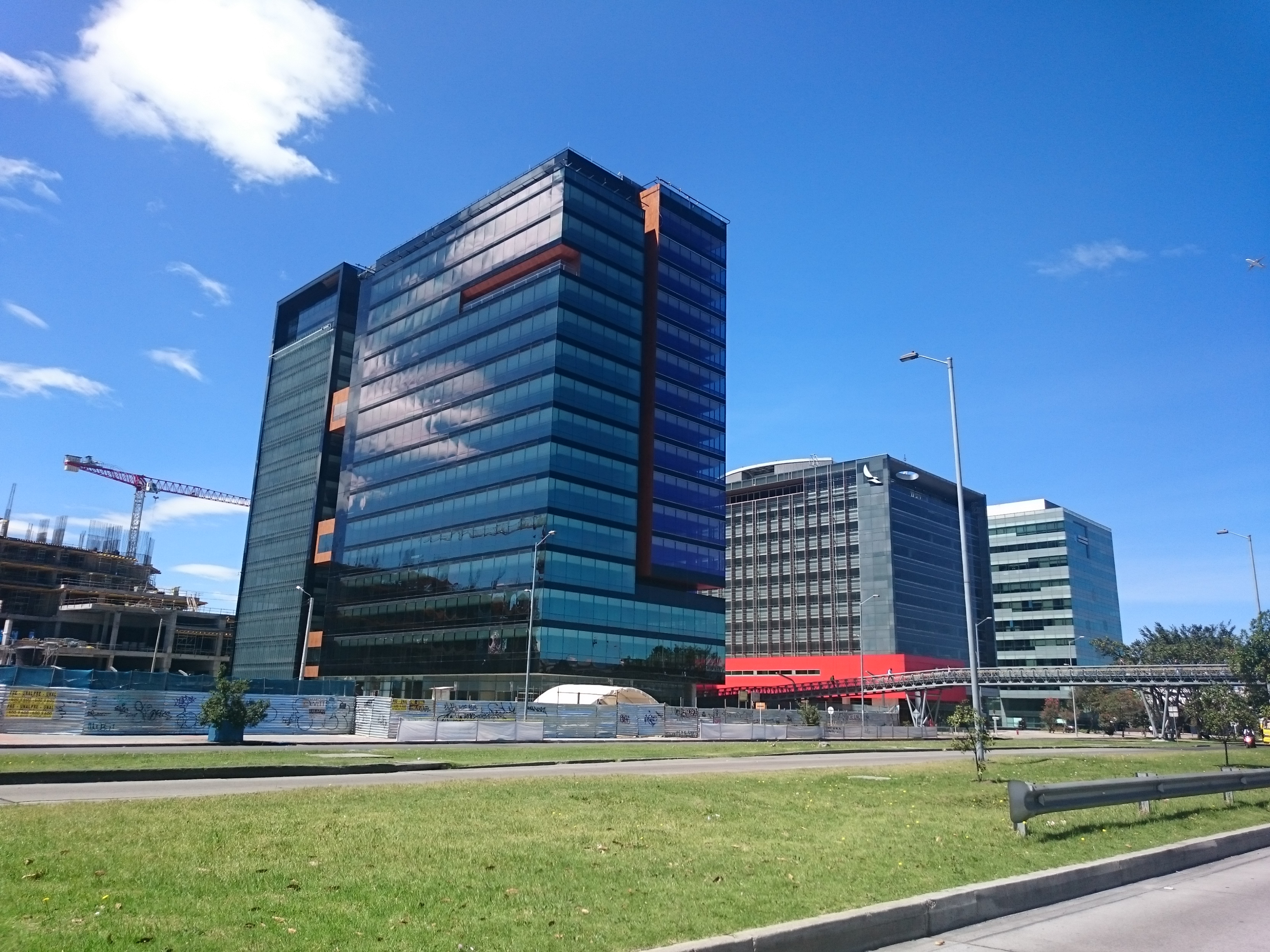 CEMSA 271215